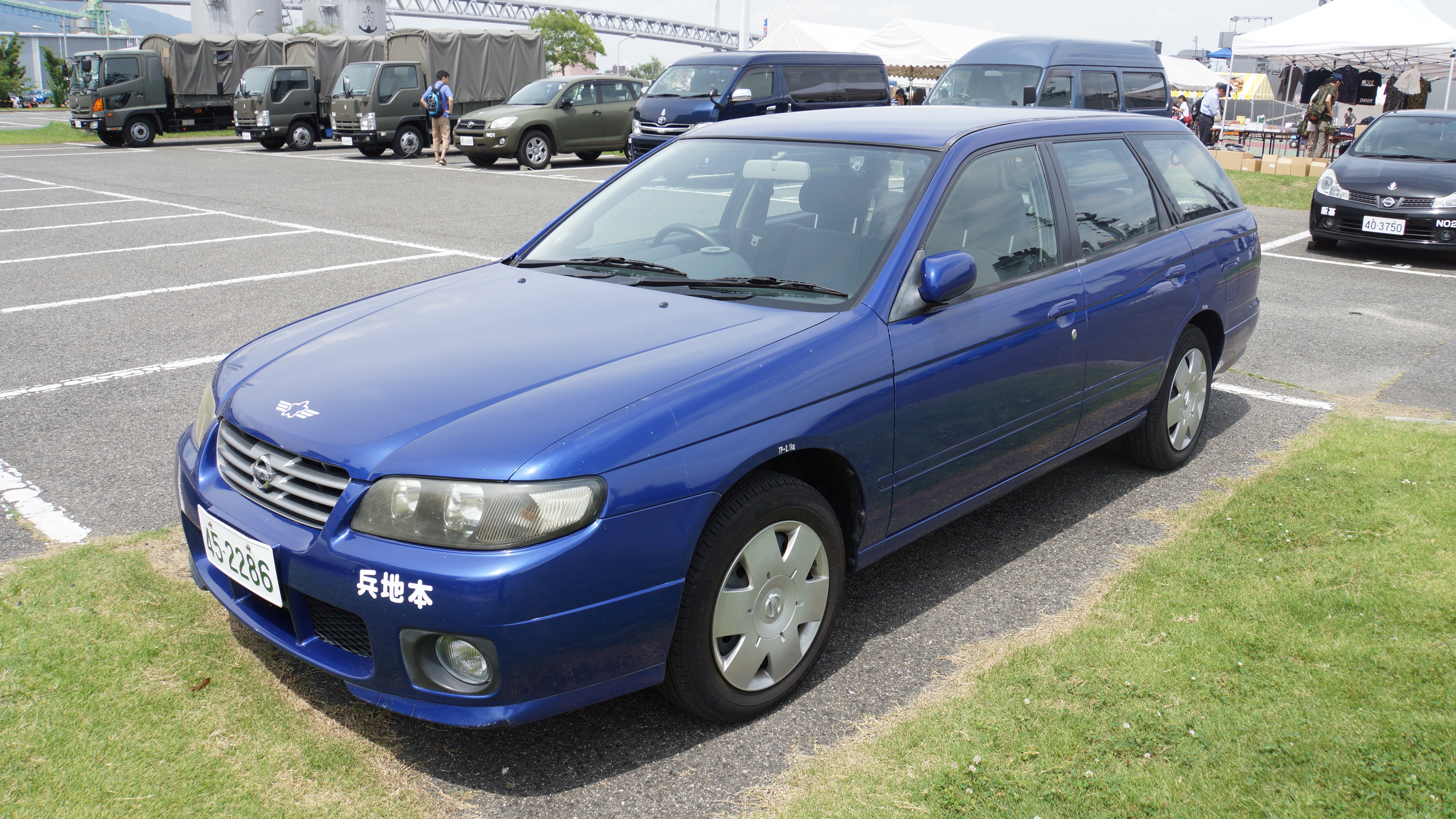 航空自衛隊 業務車（日産・アベニール 45-2286号車）。2016年7月10日 海上自衛隊阪神基地にて。